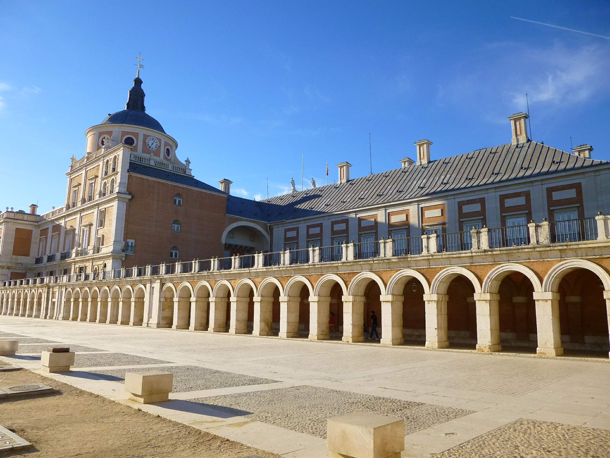 Palacio Real y Plaza de Parejas, Real Sitio de Aranjuez